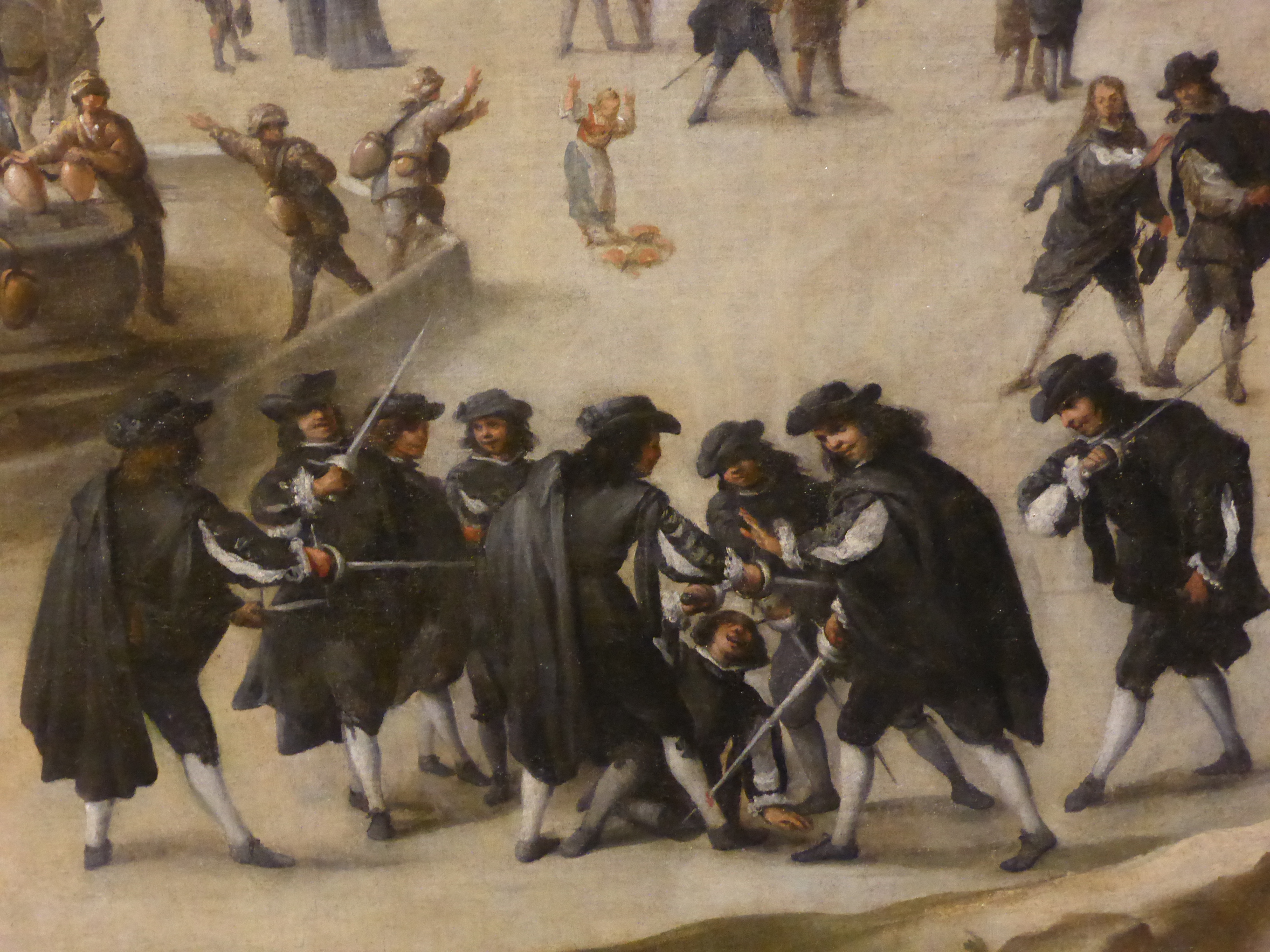 Detalle que se encuentra en la pintura titulada "Milagro de la Virgen de Atocha en las obras de construcción de la Casa de la Villa", hacia los años 1676-1700. El tema es la salvación de un caballero víctima de un lance de capa y espada. Óleo sobre lienzo. Museo de Historia de Madrid. Espada ropera.